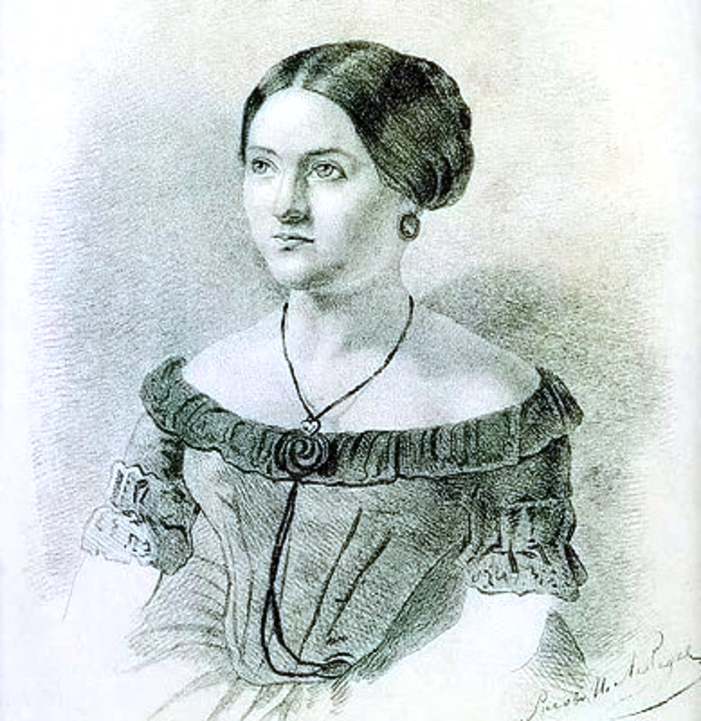 Косицкая-Никулина, Любовь Павловна